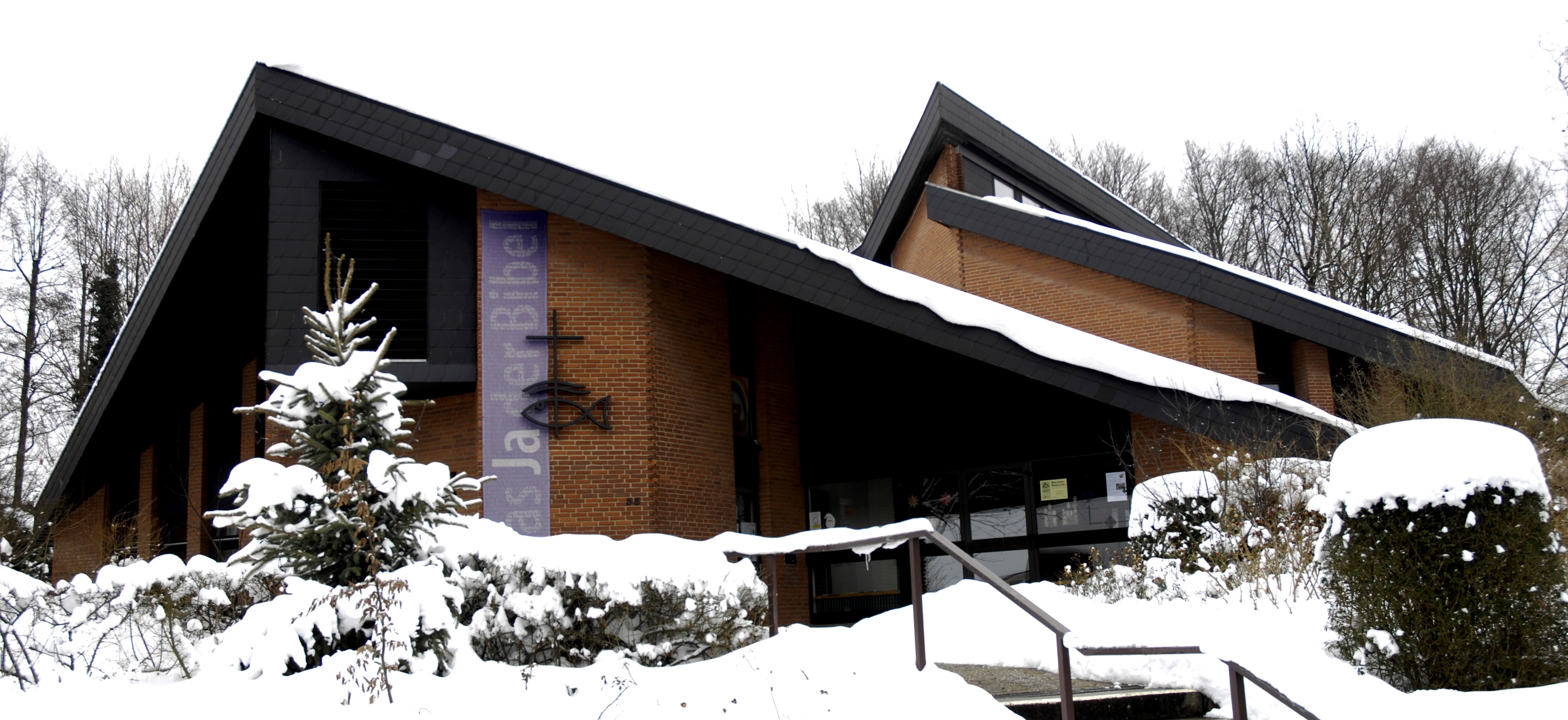 Arche-Noah-Kirche in Bielefeld-Schröttinghausen